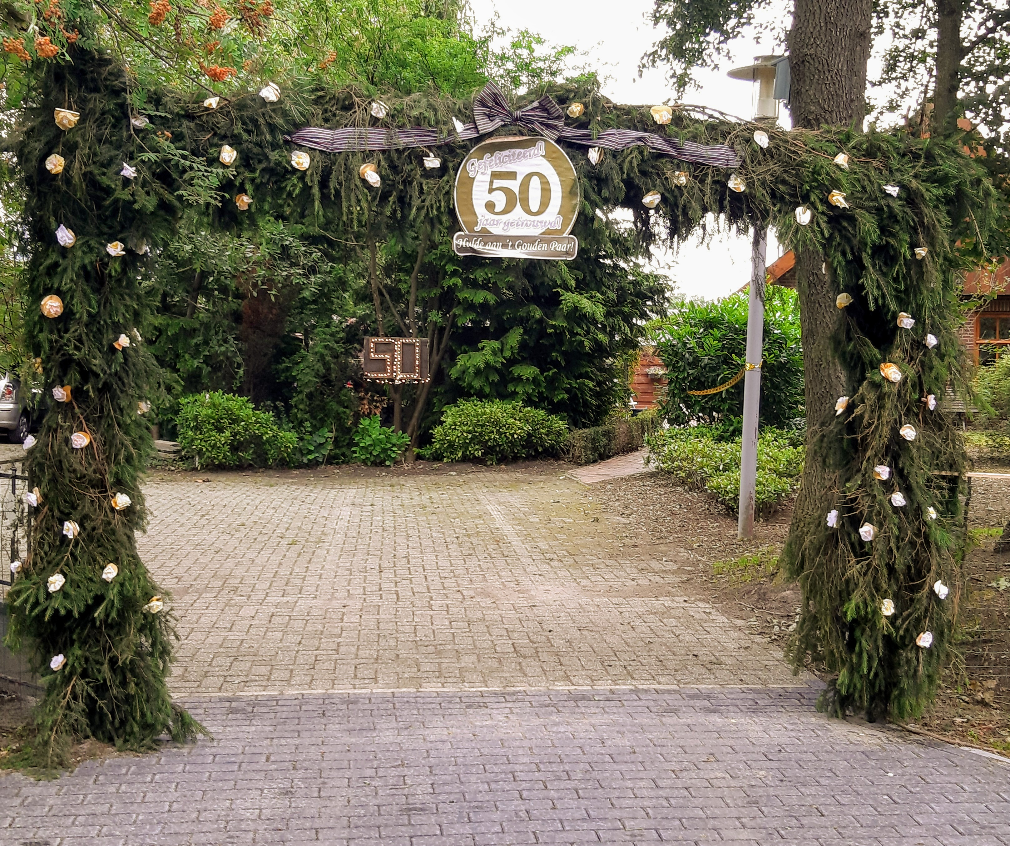 Huwelijksboog ter ere van een 50 jarig jubileum